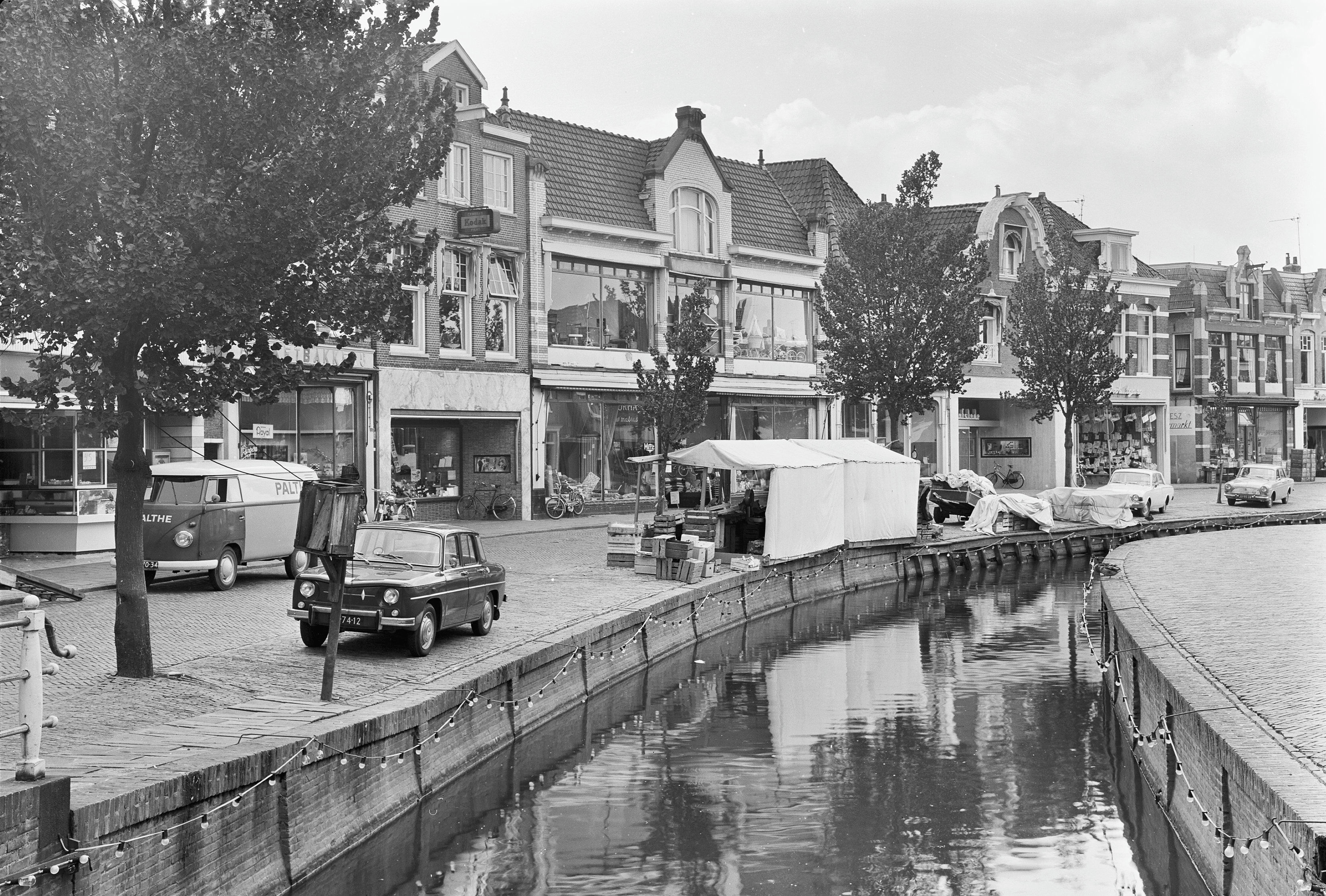 overzicht Grootzand